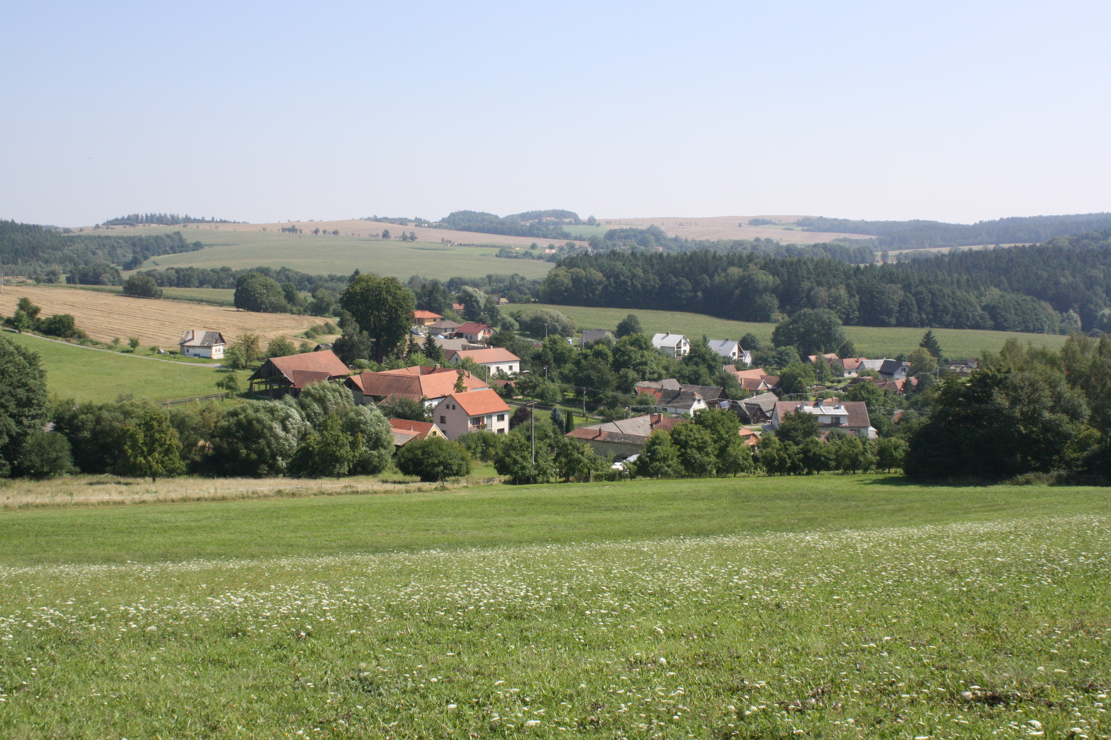 Pohled na obec ze severozápadu